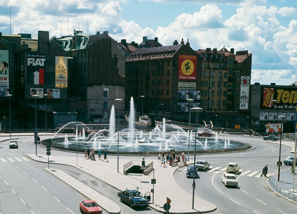 Vy från terrassen vid Göteborgs Banks hus på Sveavägen mot Sergelstorgsfontänen. I fonden kv. Skansen och Fyrmörsaren med fasadreklam för bland andra Luxor, Fiat, Pommac och Tend